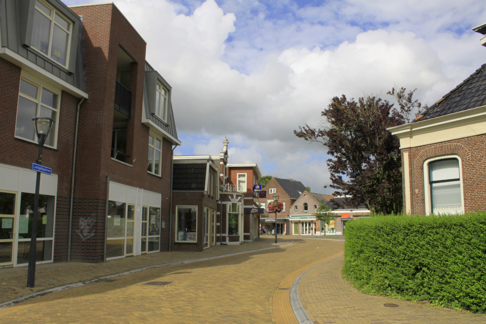 De Langebuorren in Stiens in de Gemeente Leeuwarderadeel. Friesland.